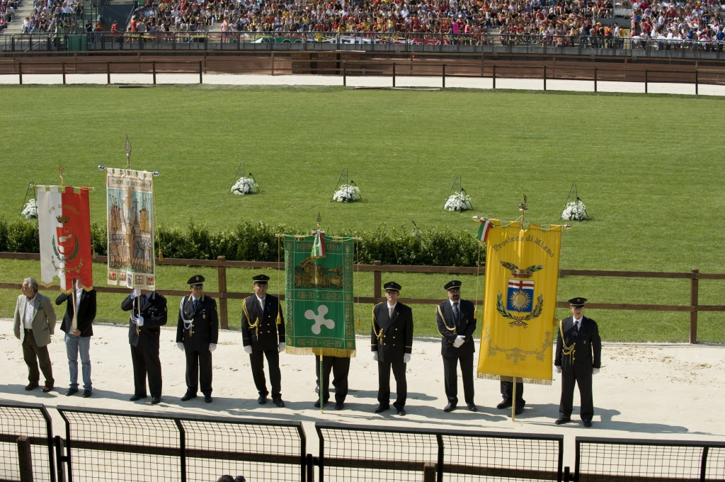 Gonfaloni allo stadio Giovanni Mari prima della corsa ippica - Palio di Legnano 2014